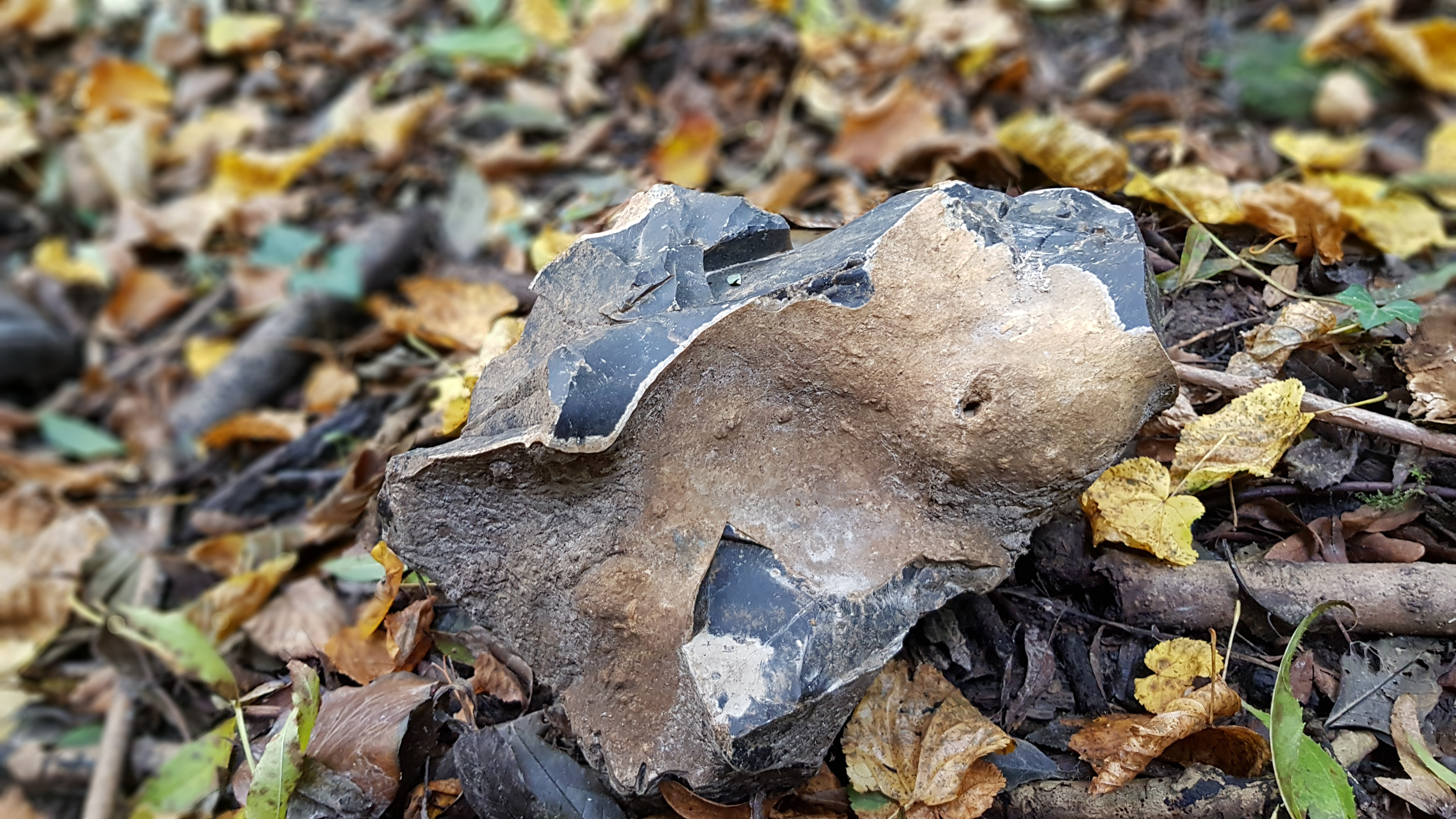 Schone Grub vuursteenmijntjes in het Savelsbos, Rijckholt, Nederland